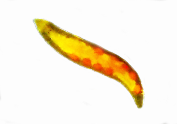 岡山県倉敷市の水田で採集したタンボヒメウズムシ